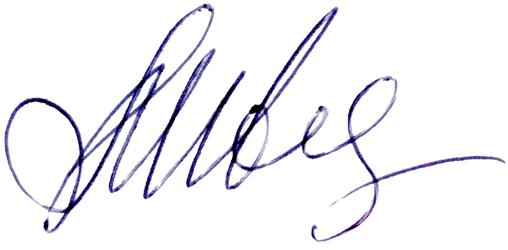 Автограф Л.М. Ивановой